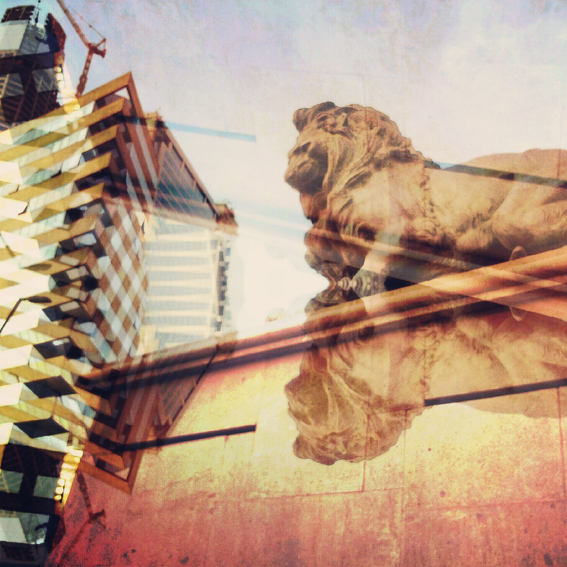 Corresponden a dos magníficas y valiosas figuras de bronce que fueron donadas por el aristocrático vecino Arturo Lyon a la ciudad de Santiago, y que actualmente están en la Avenida Providencia.